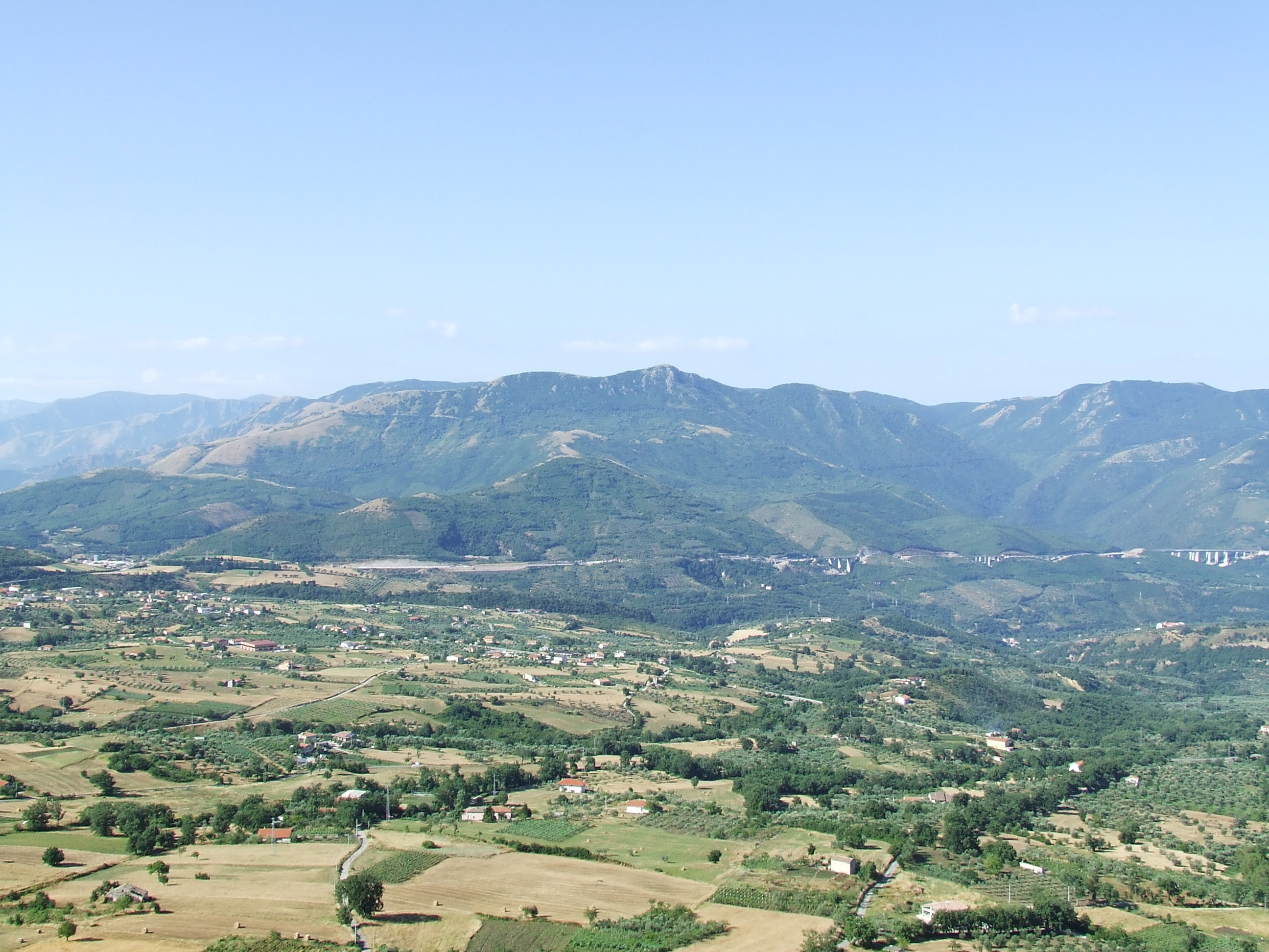 Alburni e Valle del Tanagro visti da Caggiano